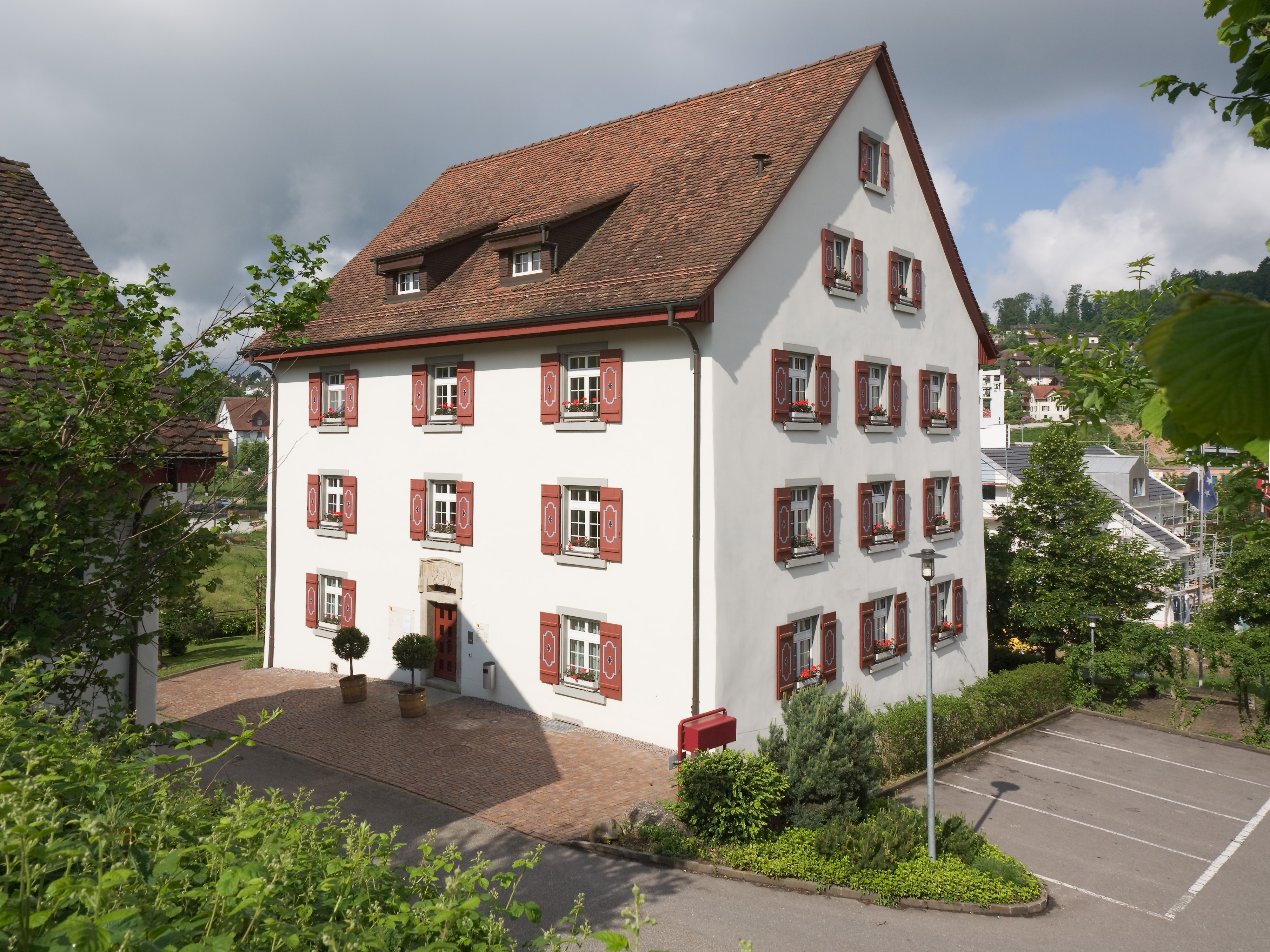 Das Gemeindehaus von Rudolfstetten-Friedlisberg, Schweiz